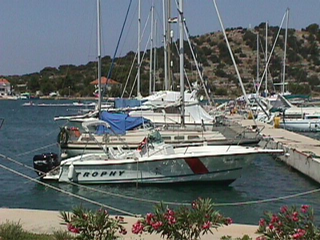 Marina Betina